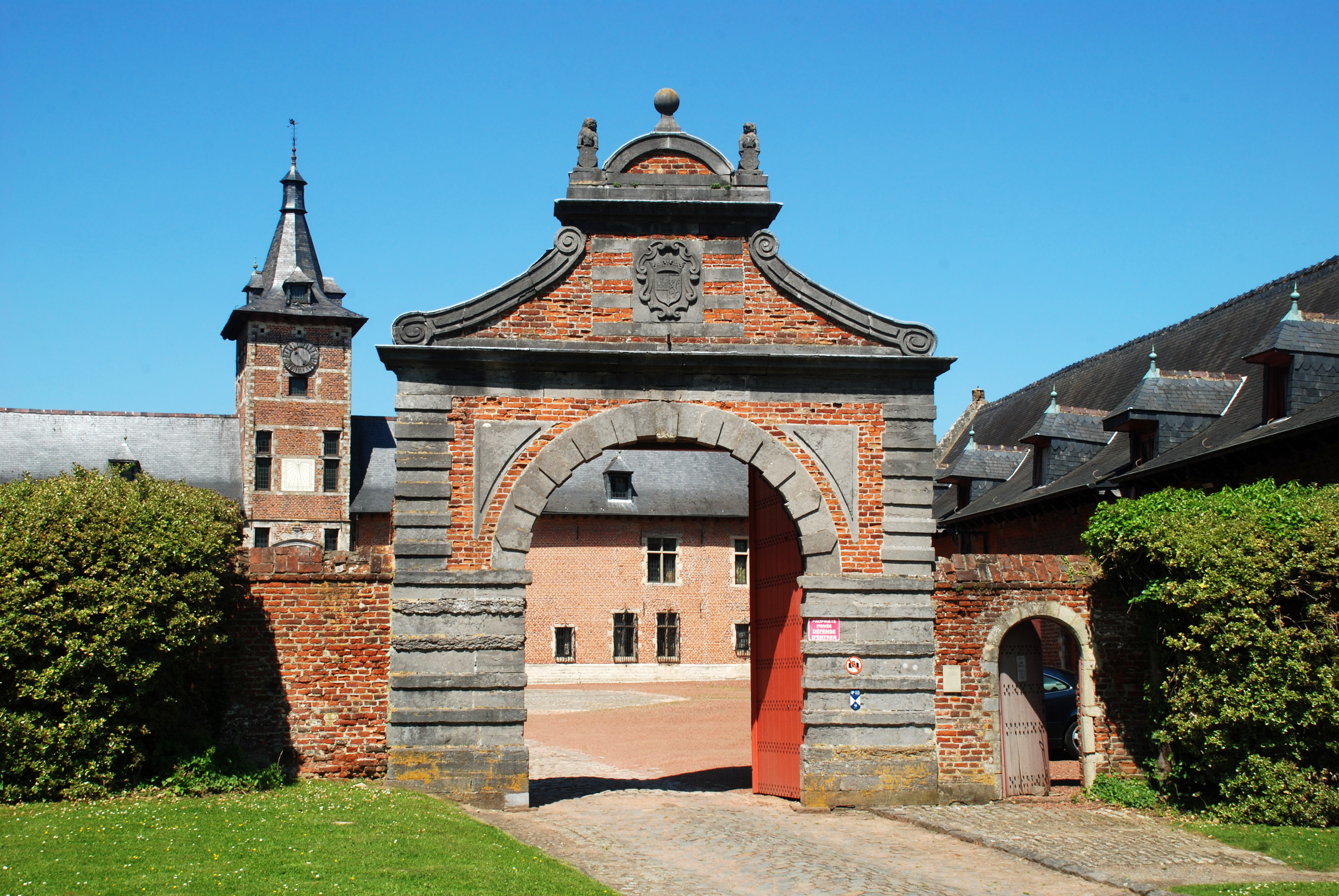 Belgique - Brabant wallon - Château de Rixensart